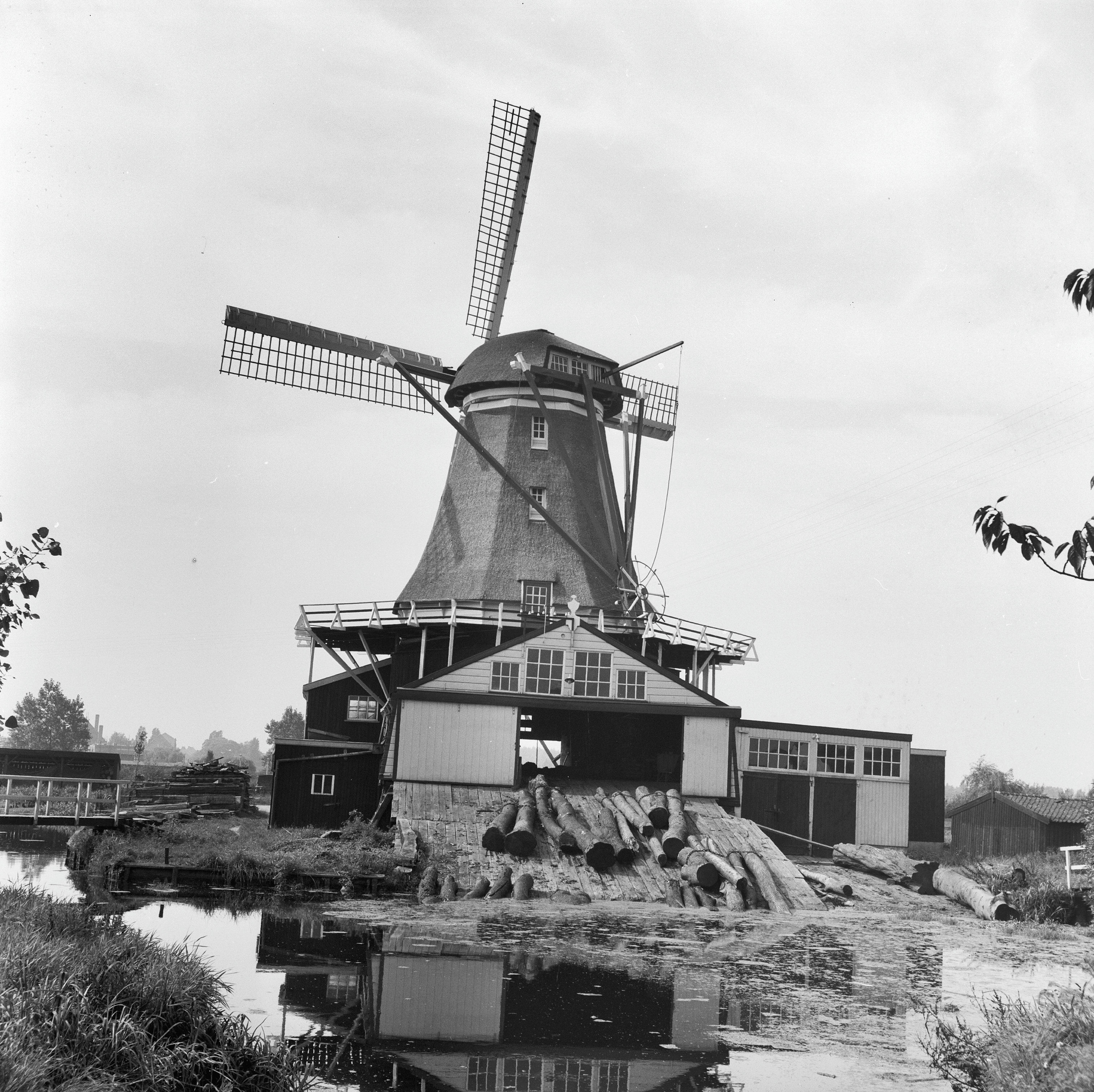 Molens: zaagmolen "De Herder", aanzicht